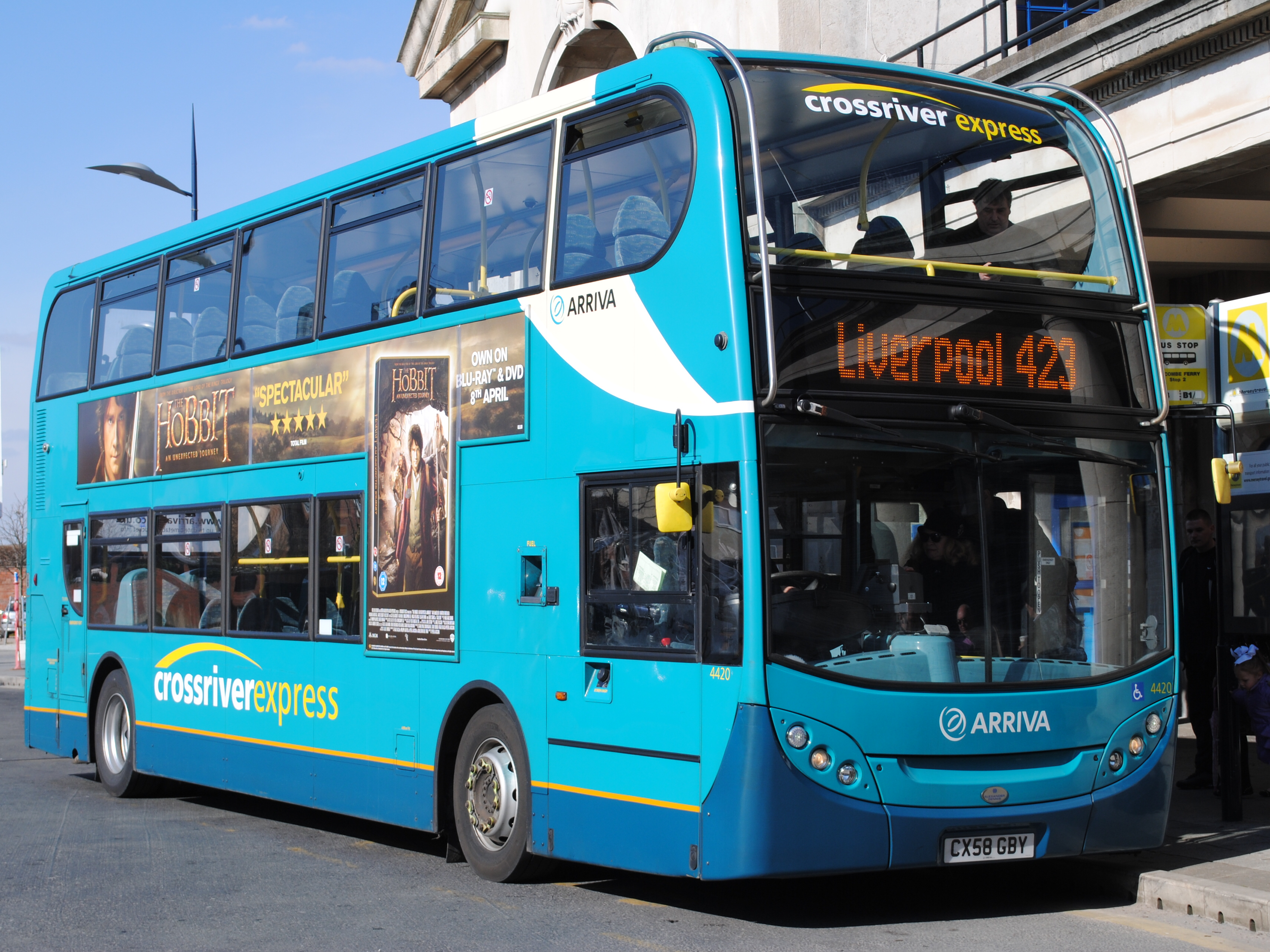 Alexander Dennis Enviro 400